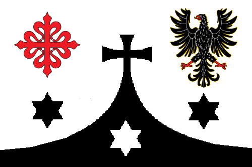 Bandera de Malagón (Ciudad Real)